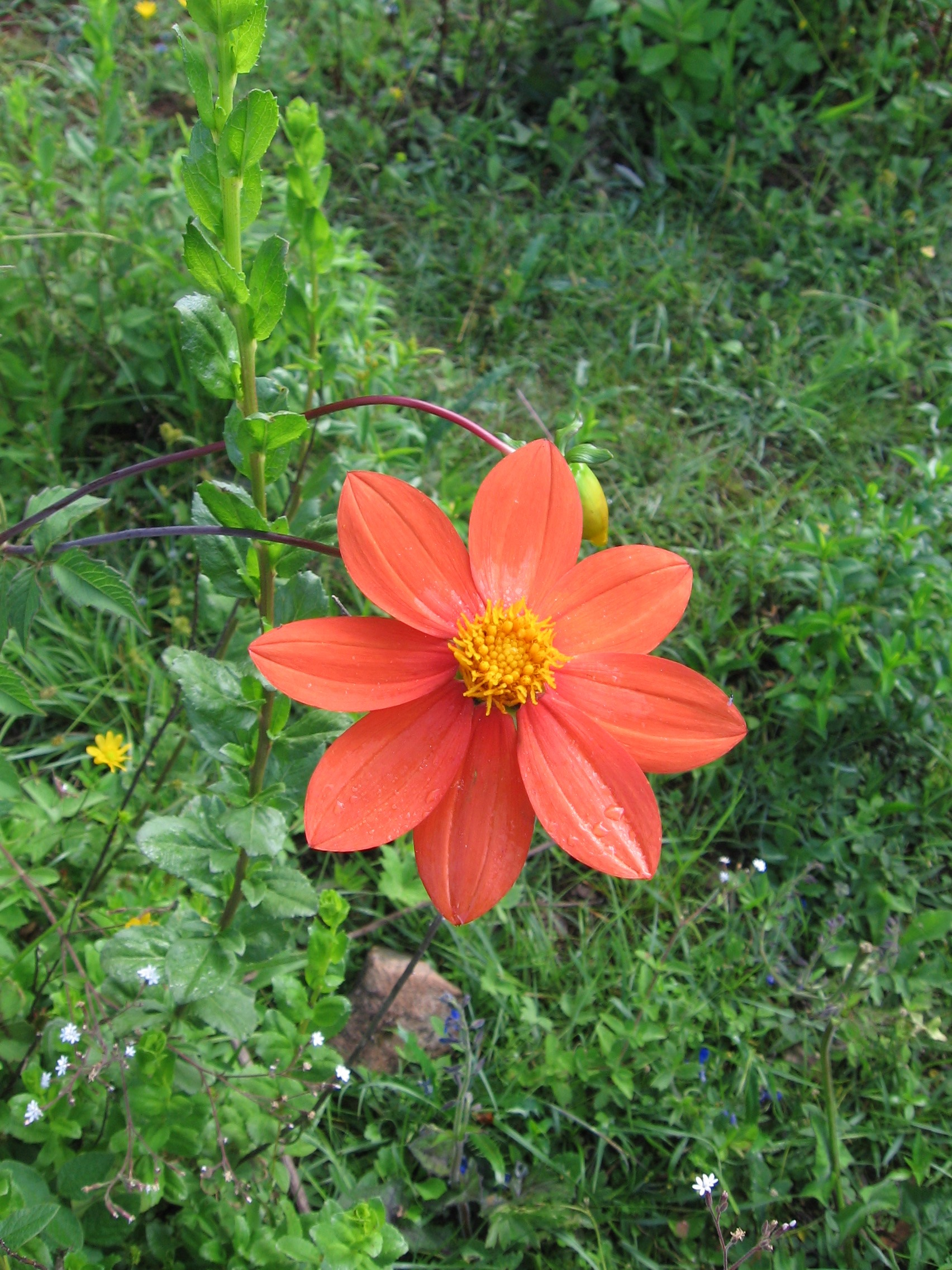 Dalia, Flor Nacional Mexicana